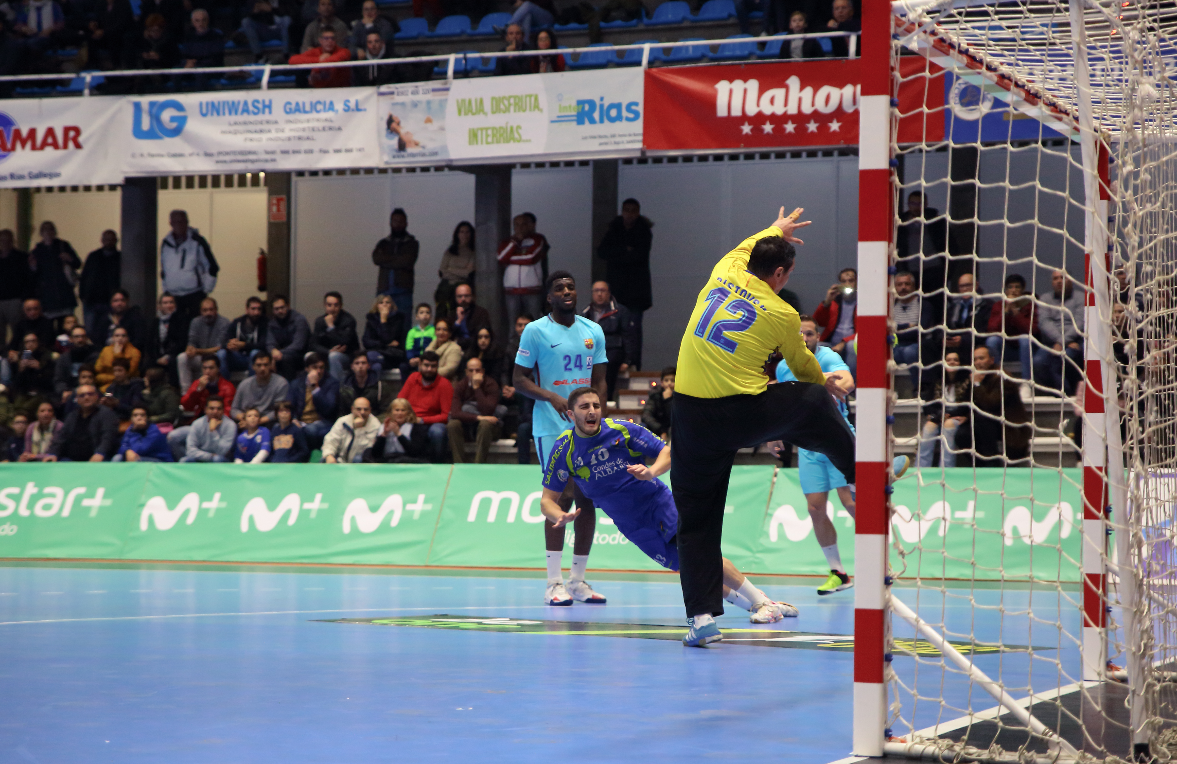 Condes de Albarei Teucro – FC Barcelona Lassa: (28-38) Los de Xavi Pascual derrotan al equipo gallego y cierran la primera vuelta de la Asobal con un nuevo triunfo en la competición doméstica, en un partido en el que Valero Rivera ha sido el máximo anotador